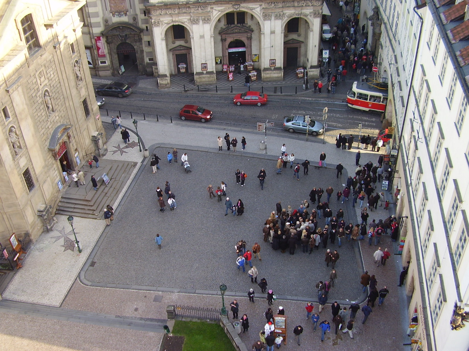 Pohled na Křižovnické náměstí z mostecké věže.